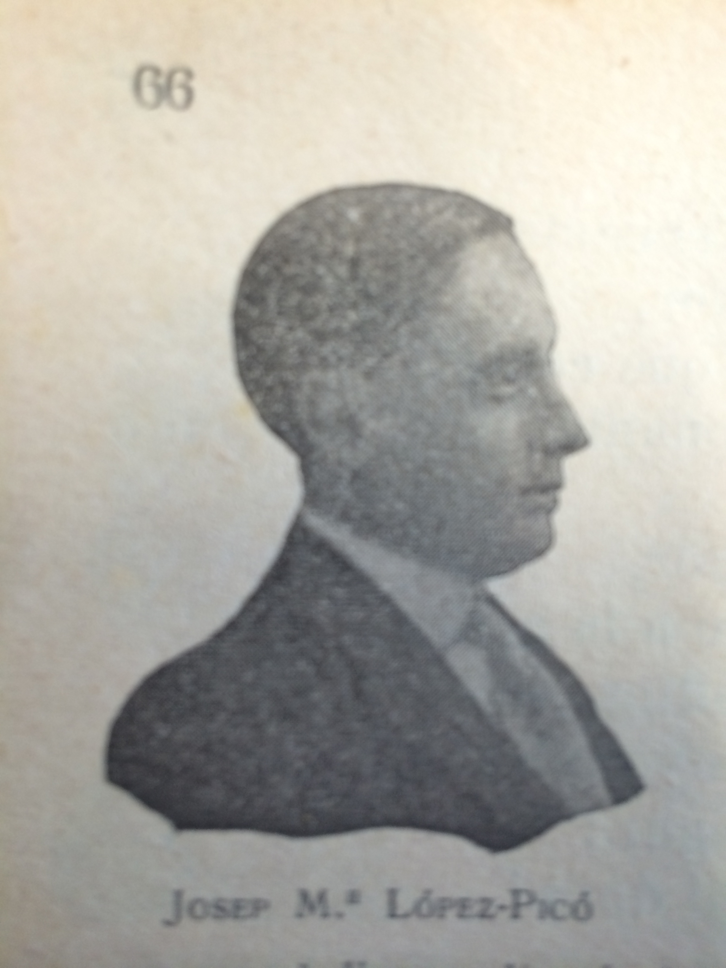 Josep Maria López-Picó (Barcelona 1886 - 1959) fou un poeta i editor català.